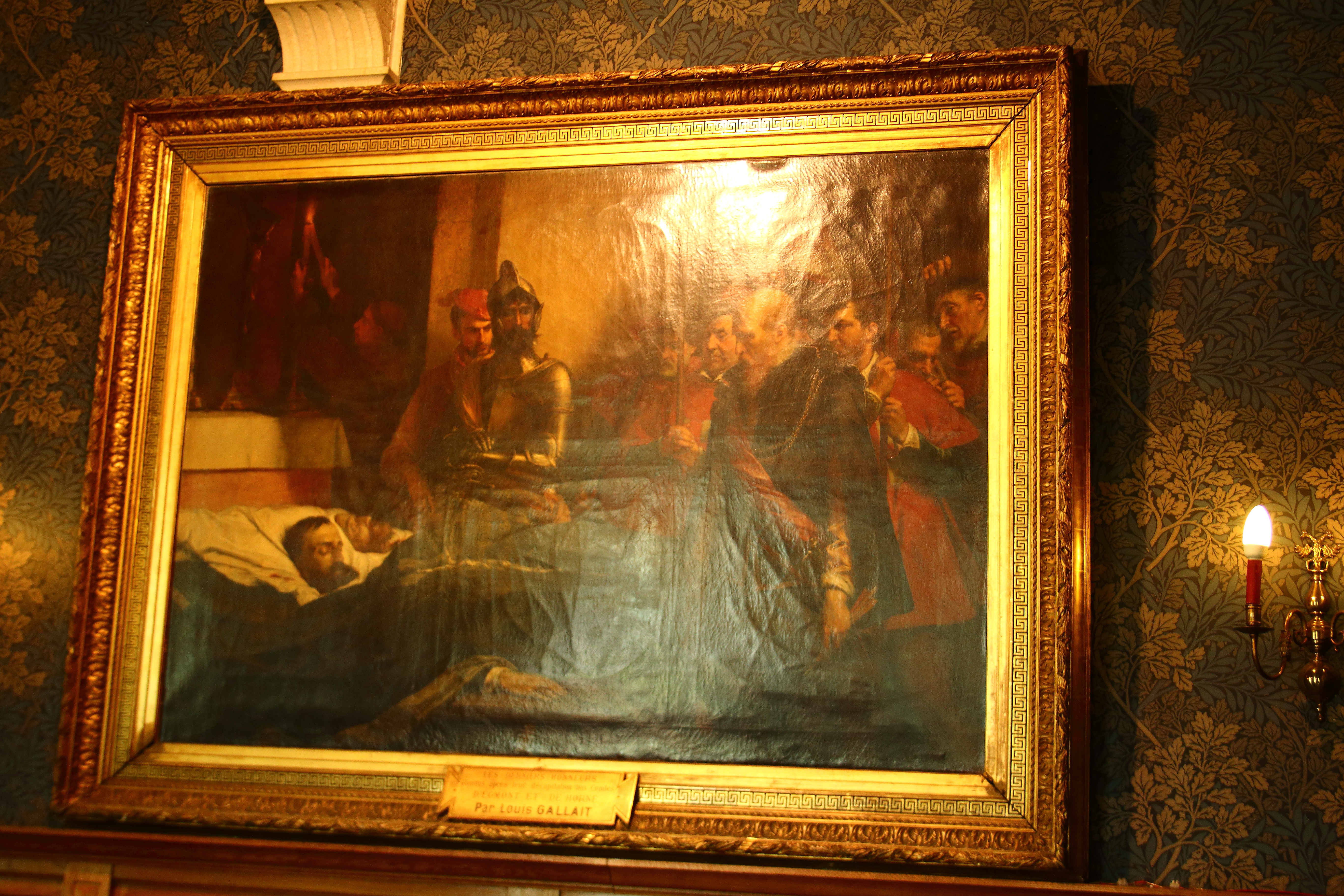 'Laatste eerbewijzen aan Egmont en Horne', Louis Gallait, stadhuis Zottegem